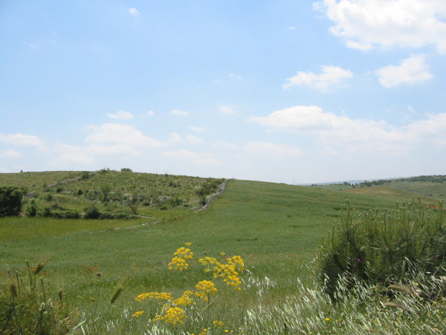 Gli altipiani degli Iblei